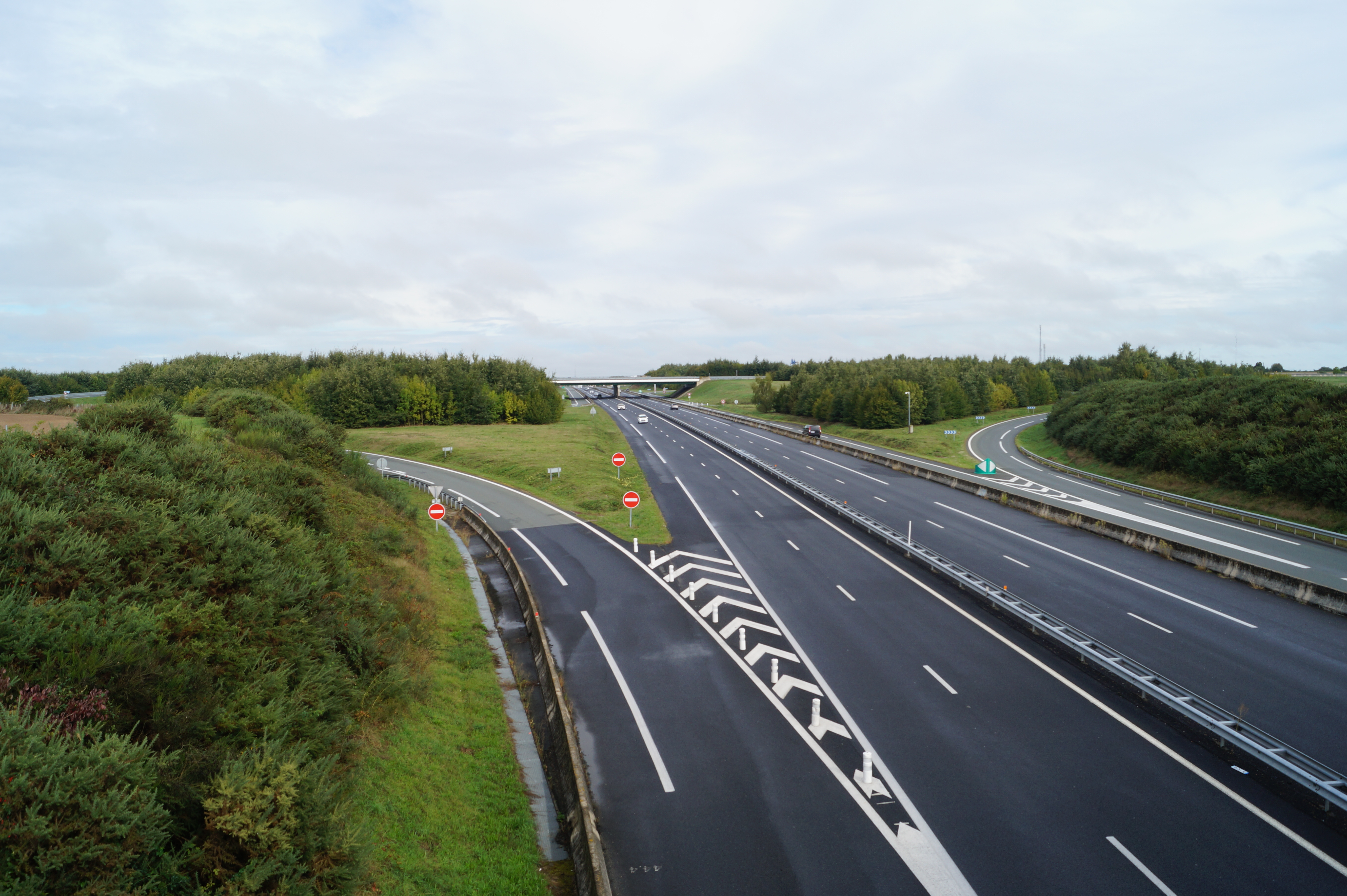 L’échangeur des Essarts entre les autoroutes A83 et A83, vu depuis la Clémencière, aux Essarts.